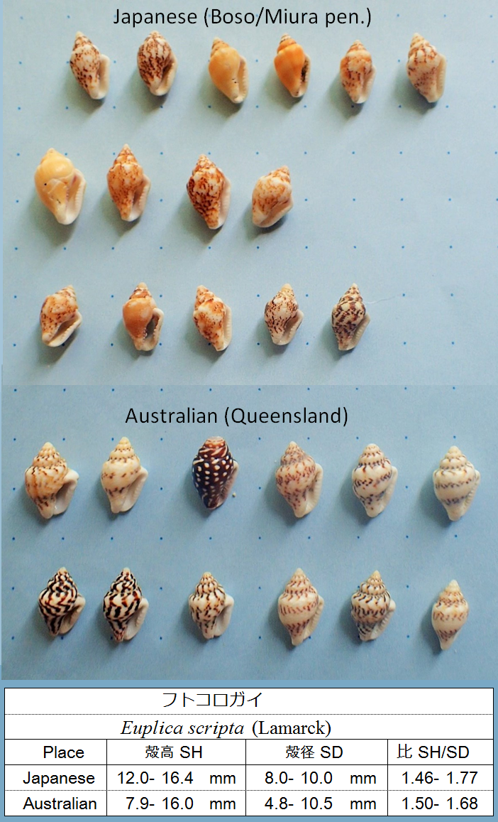 日本産は房総半島の沖ノ島と根本および三浦半島の水戸浜。オーストラリアはダンク島産で、やや黒っぽい色があり、肩がはってマッチョな感じ。日豪とも柄の変異は多そう。